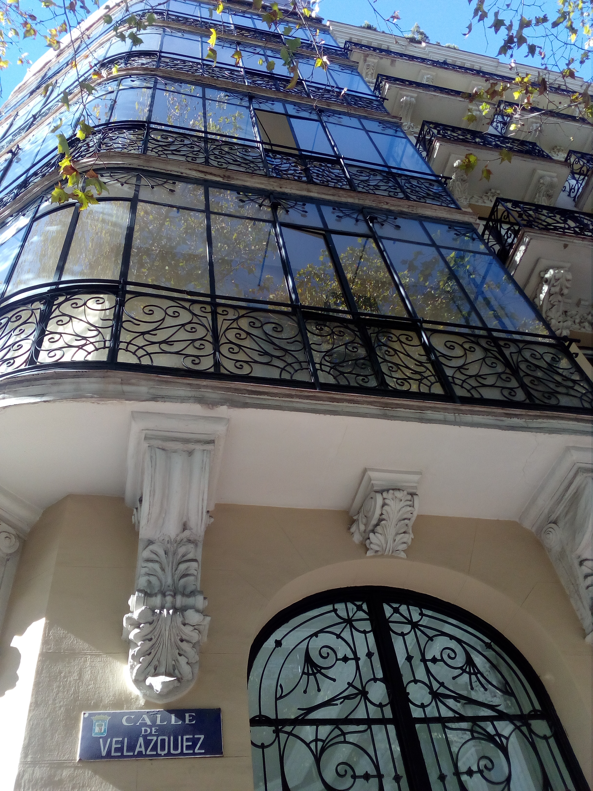 Fachada de la calle Velazquez nº 9 de Madrid. Restaurada